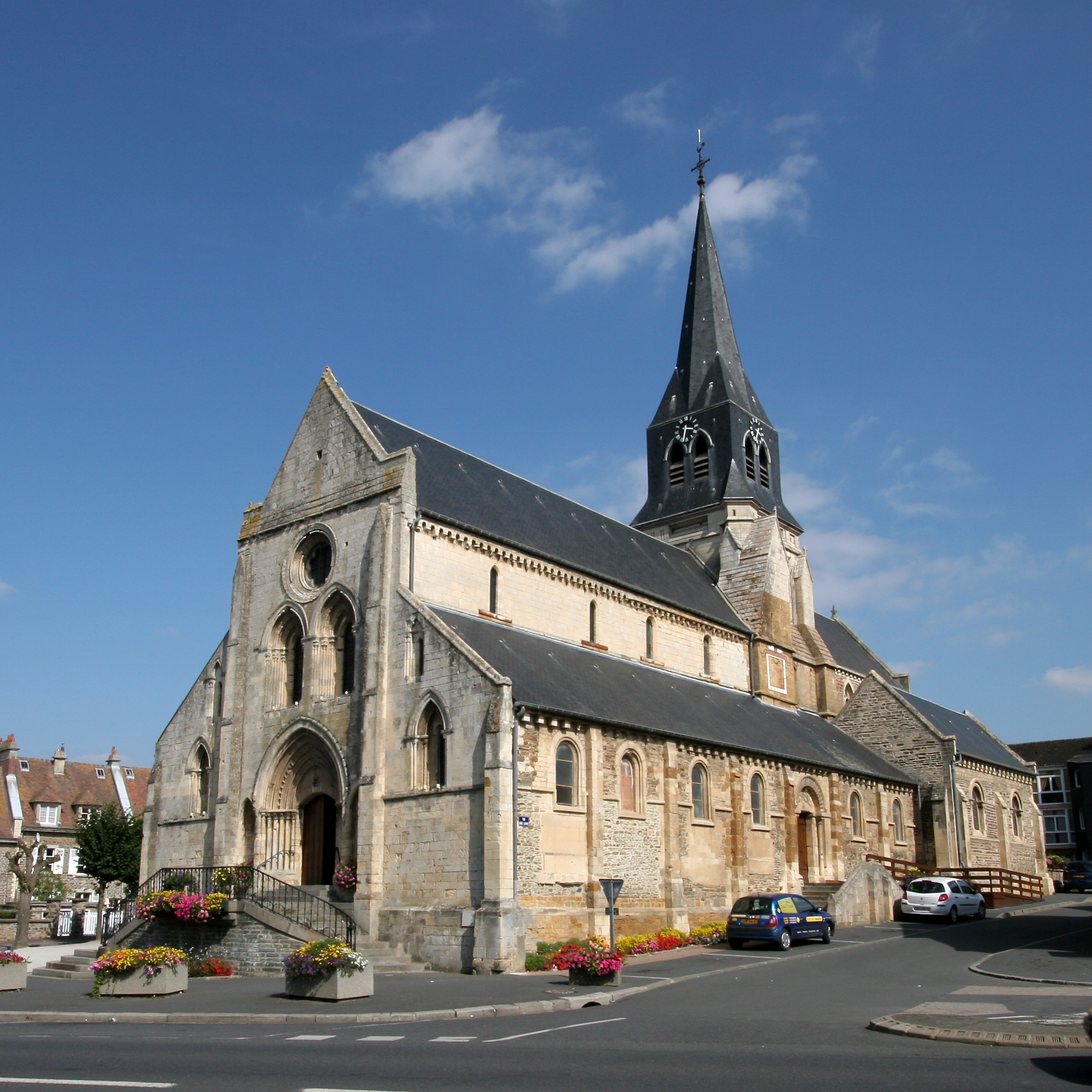 Eglise Saint Sauveur de Thury-Harcourt, Calvados, France